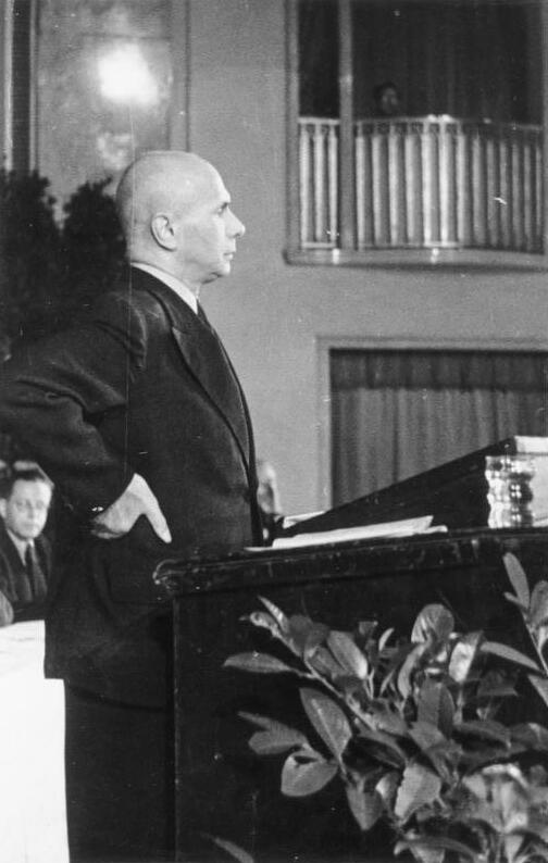 Berlin, CDU- Parteitag, Jakob Kaiser Zentralbild Berlin: 6.-8.September 1947 Jakob Kaiser auf dem CDU-Parteitag der CDU Berlins und der Ostzone Abgebildete Personen: Kaiser, Jakob: Bundesminister für gesamtdeutsche Fragen, CDU, Bundesrepublik Deutschland (GND 11855946X)